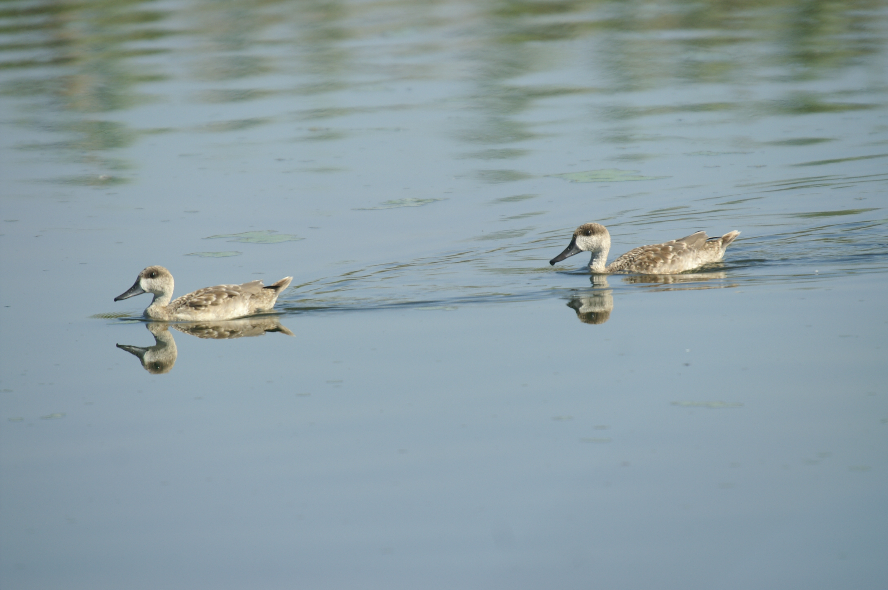 Cerceta pardilla - Marmaronetta angustirostris - Marbled Duck, Clot-de-Galvany, Alicante, España